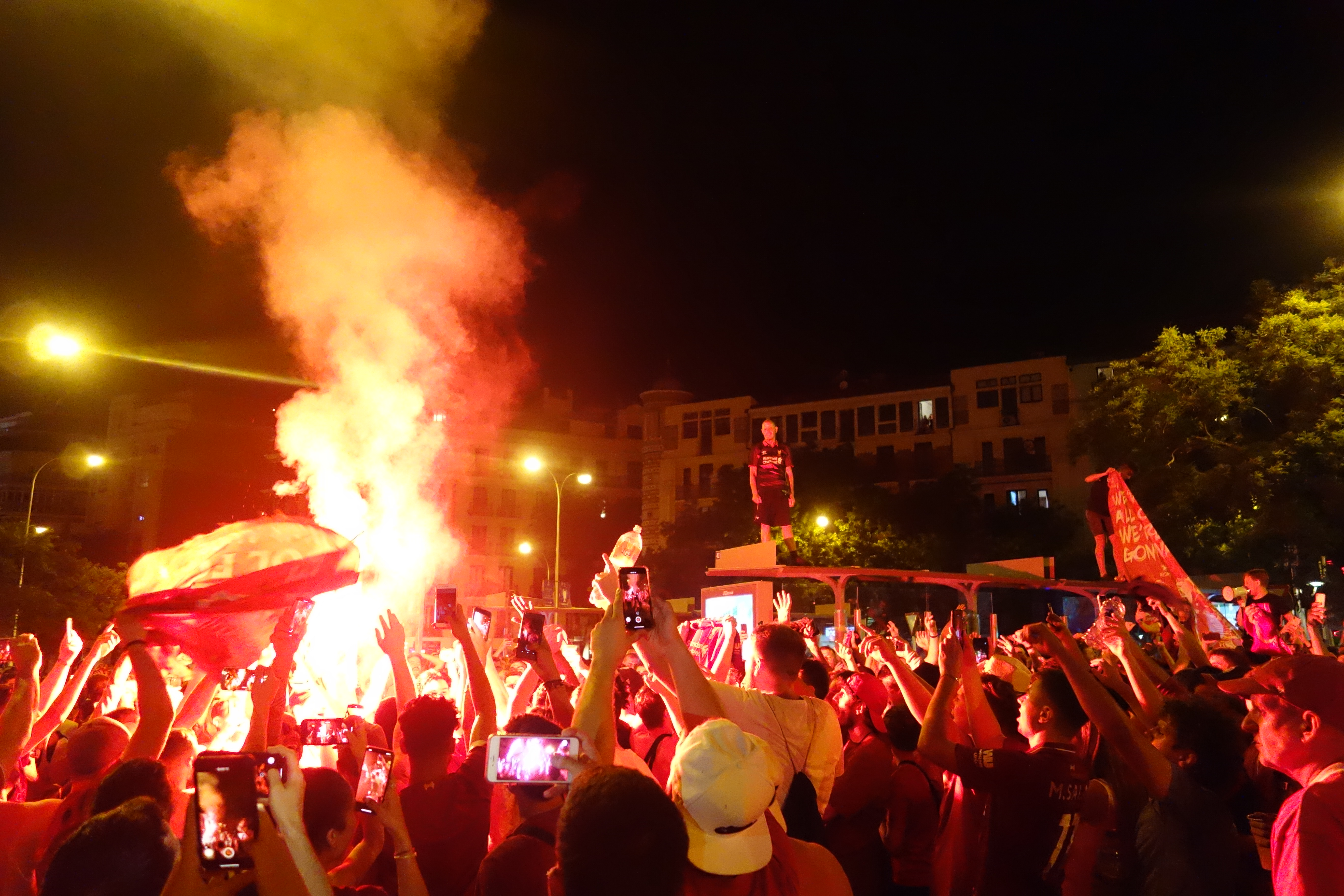 Torcedores do Liverpool festejando o título da Champions League 2018-2019 no bairro de Goya, em Madri.